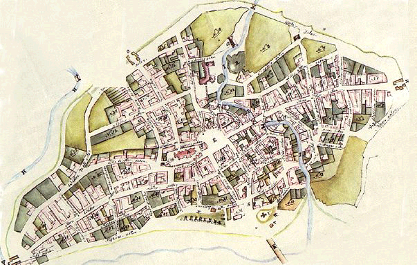 Rekonstruerad karta över Ystad på 1700-talet.